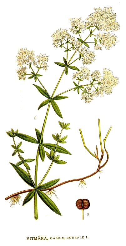 Original Description Vitmåra, Galium boreale L.